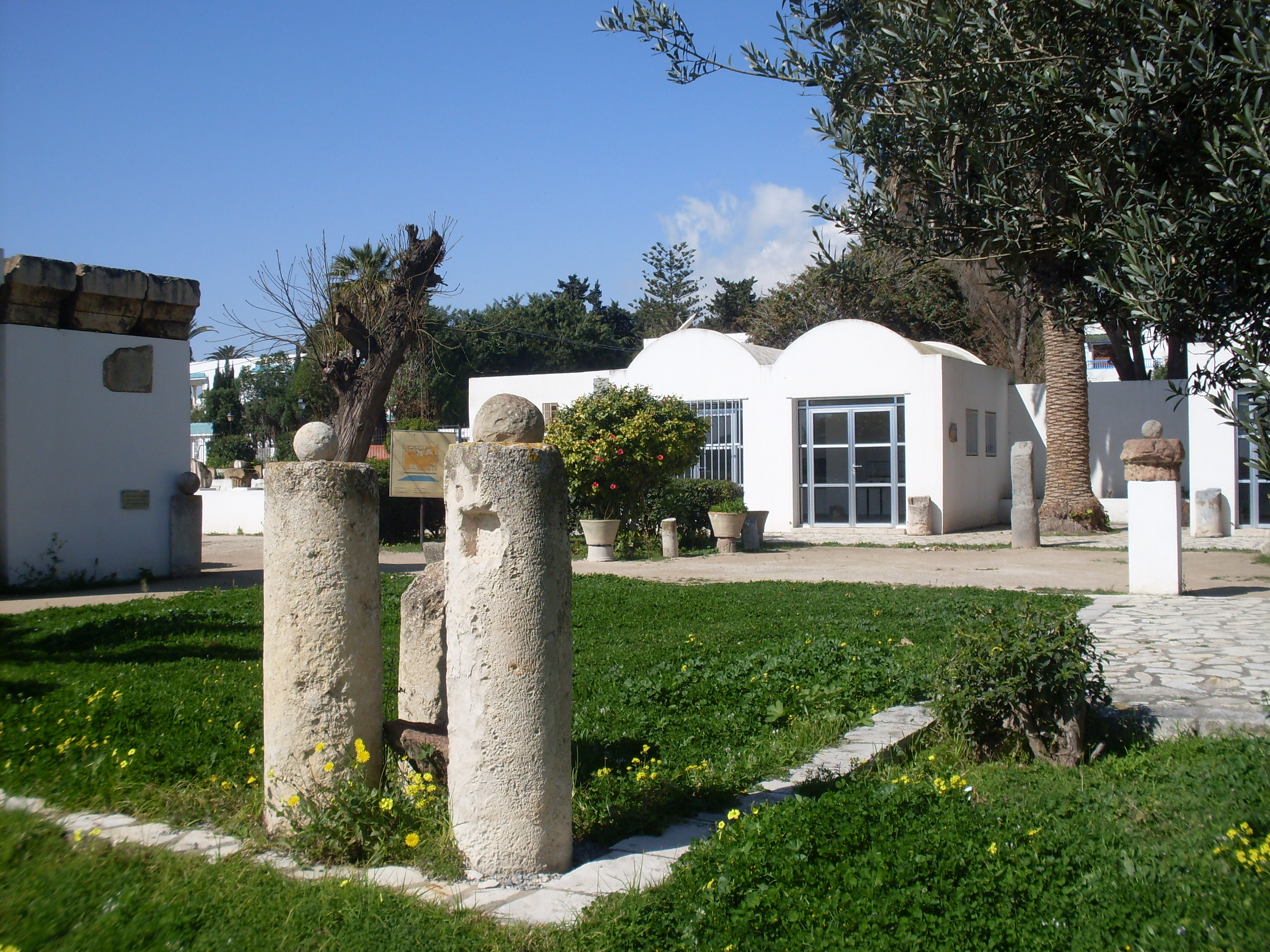 Vue globale de l'antiquarium du quartier de Magon